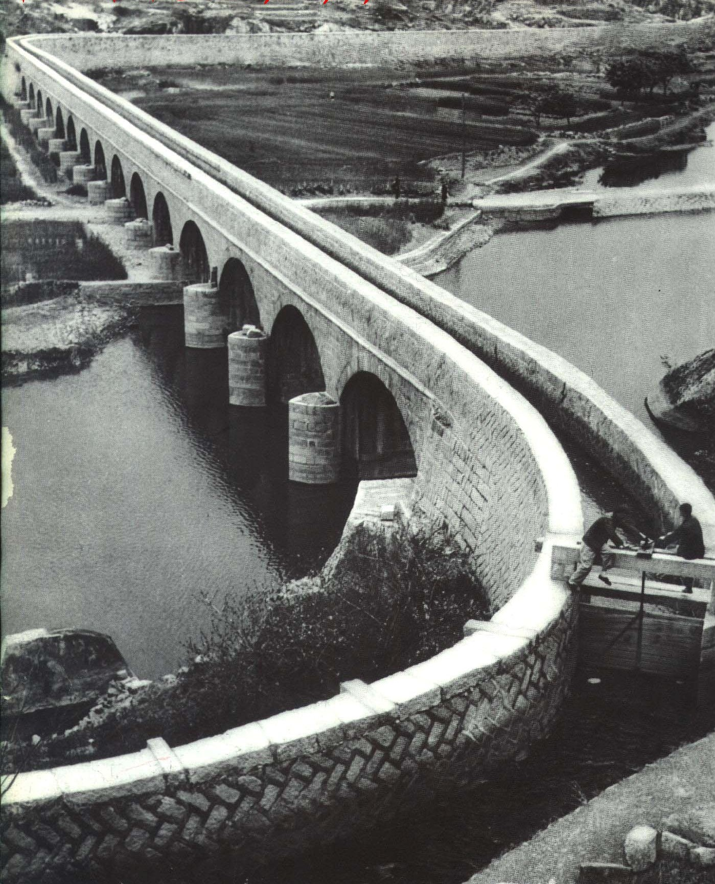 1964-06 1964年 福建长乐县三溪水库